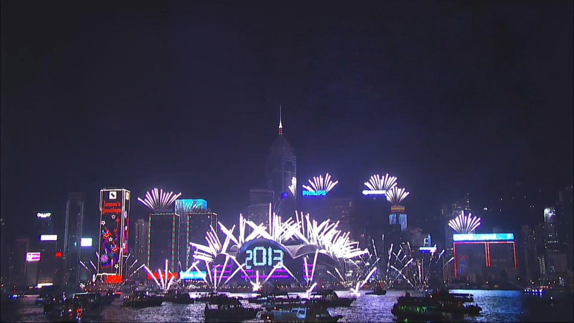 中文（香港）: 香港2013年，以香港會議展覽中心為地標之除夕倒數煙火活動，活動名為「新年．新世界．香港除夕倒數」。攝於2013年1月1日。